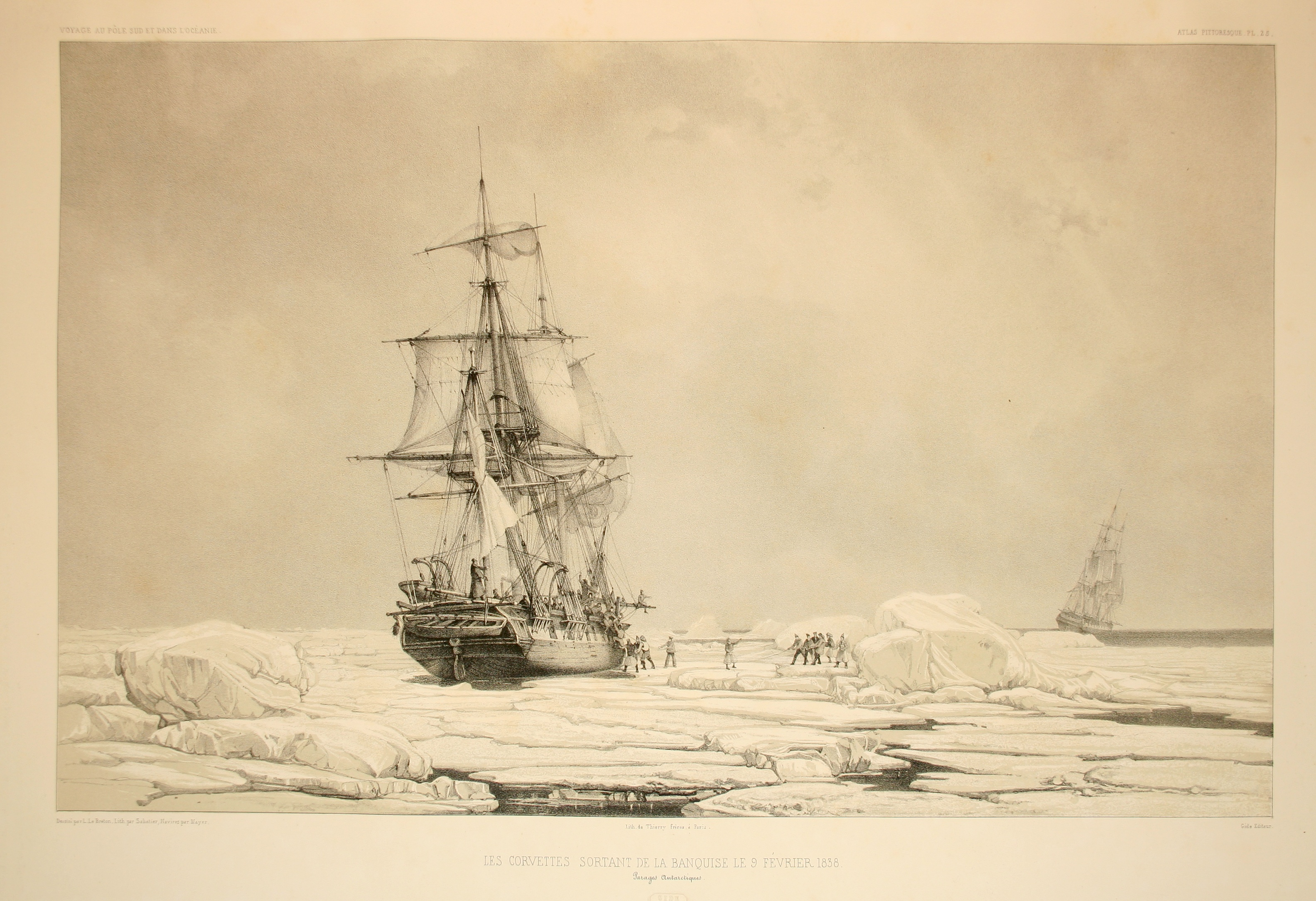 Les corvettes sortant de la banquise le 9 février 1938. Atlas pittoresque, planche 25